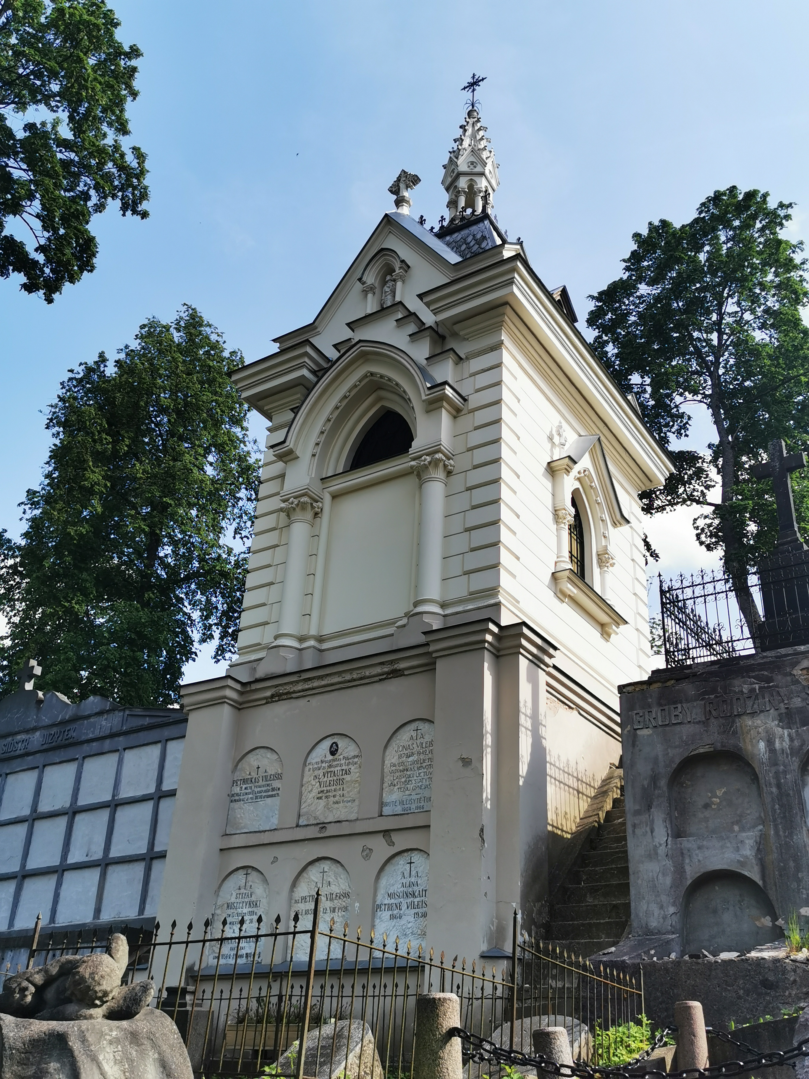 Vileišių koplyčia-mauzoliejus